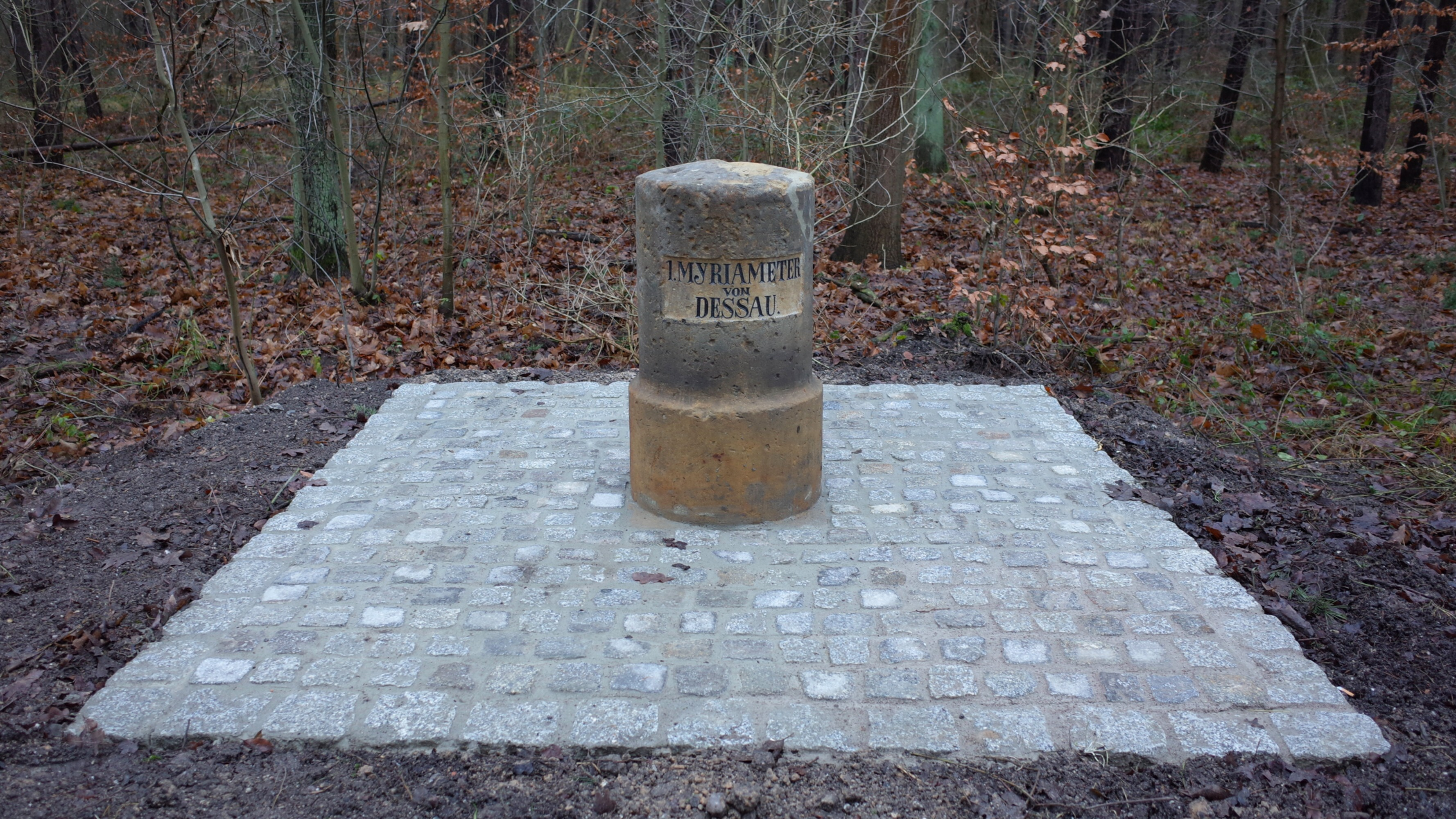 Lingenau, Anhaltischer Myriameterstein. Im Dezember 2017 wurde der fast im Erdreich verschwundene Stein gut Sichtbar am Straßenrand wieder aufgestellt.